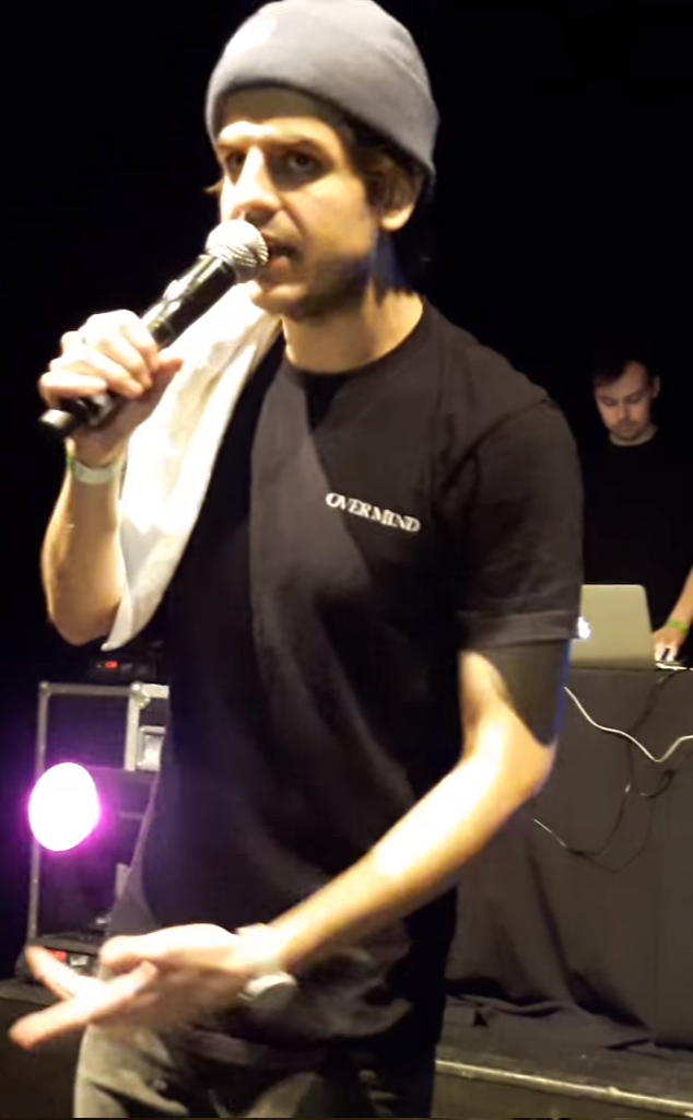 Taco podczas koncertu w Toruniu, 2016